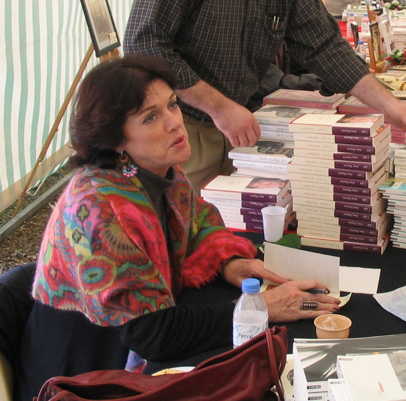 Anny Dupérey lors d'un salon du livre en Normandie